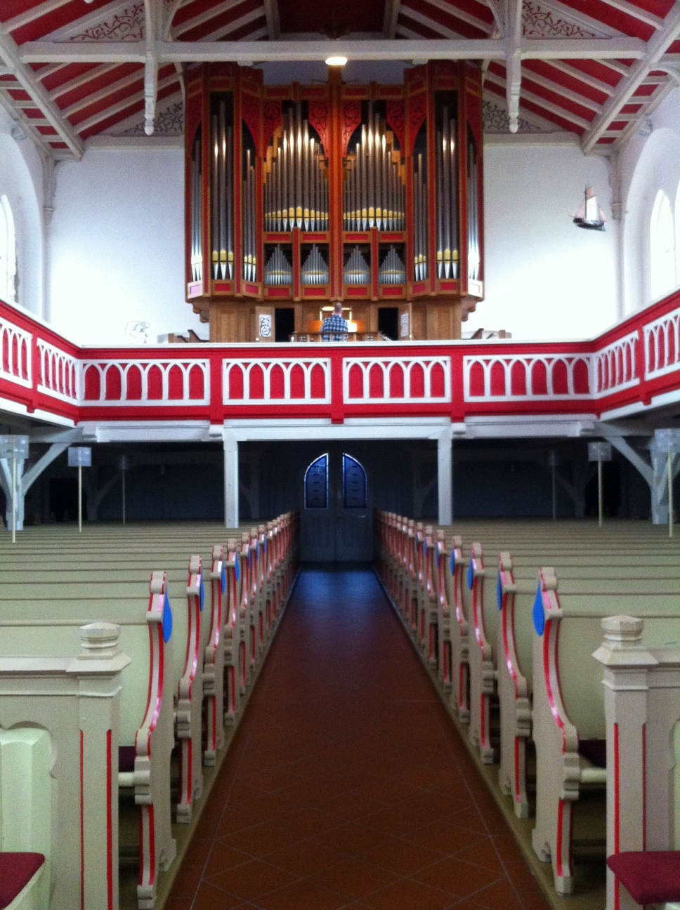 Die Orgelempore der Inselkirche Norderney